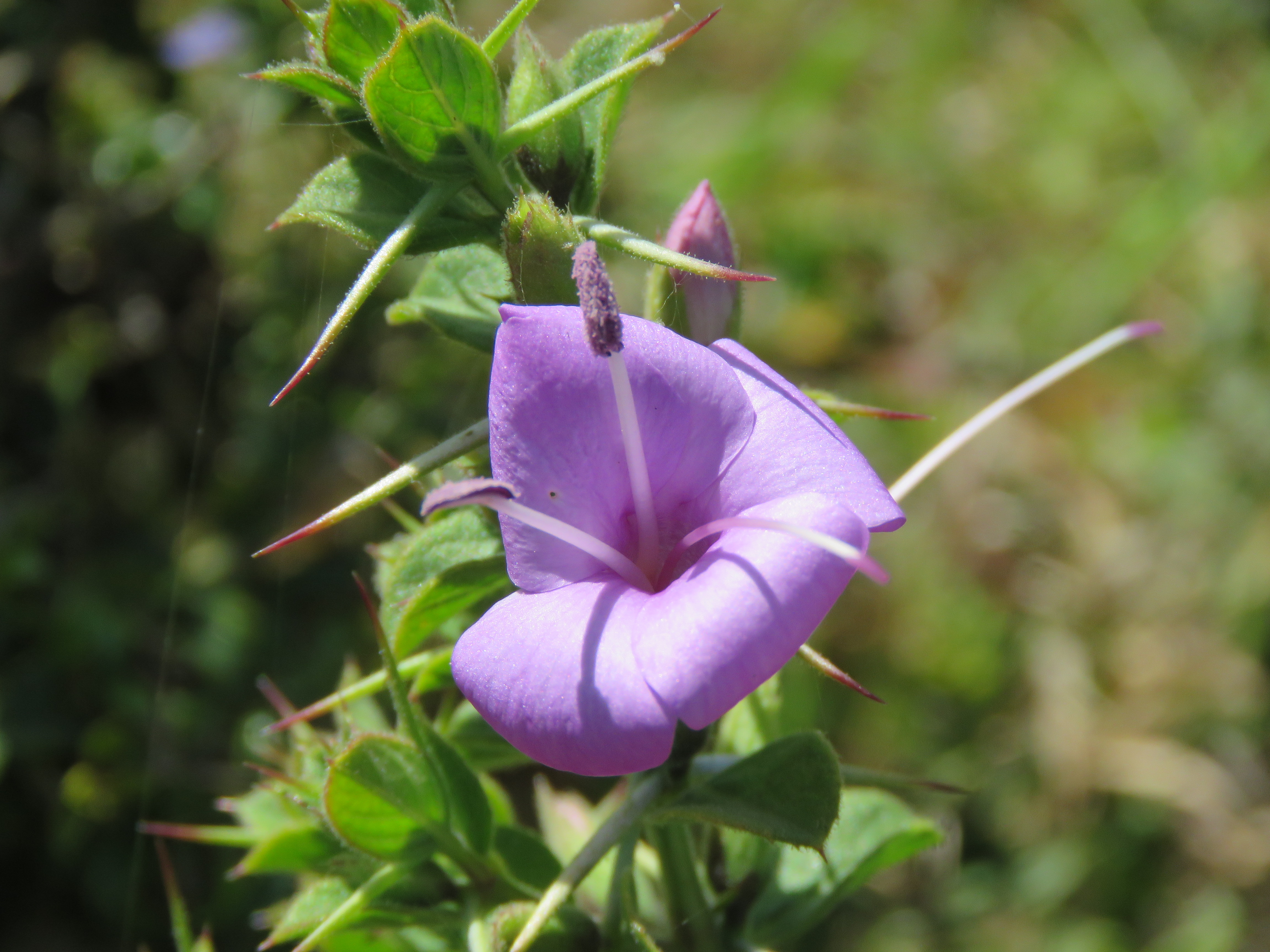 Photos by Vinayaraj